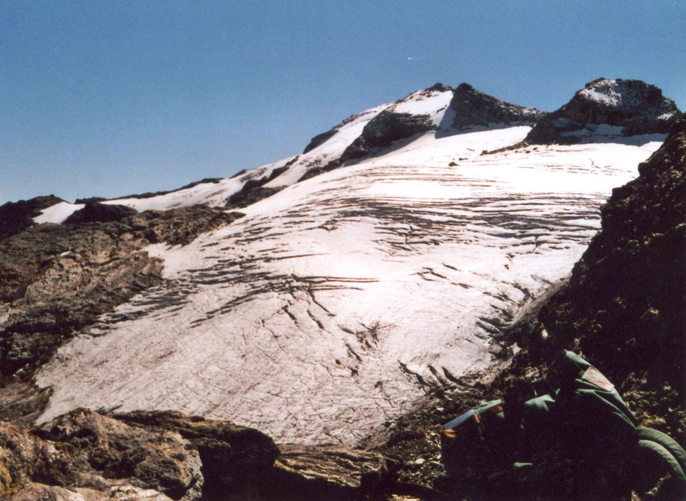 Am Piz Led: Fexgletscher mit Piz Fora im Okt 2005